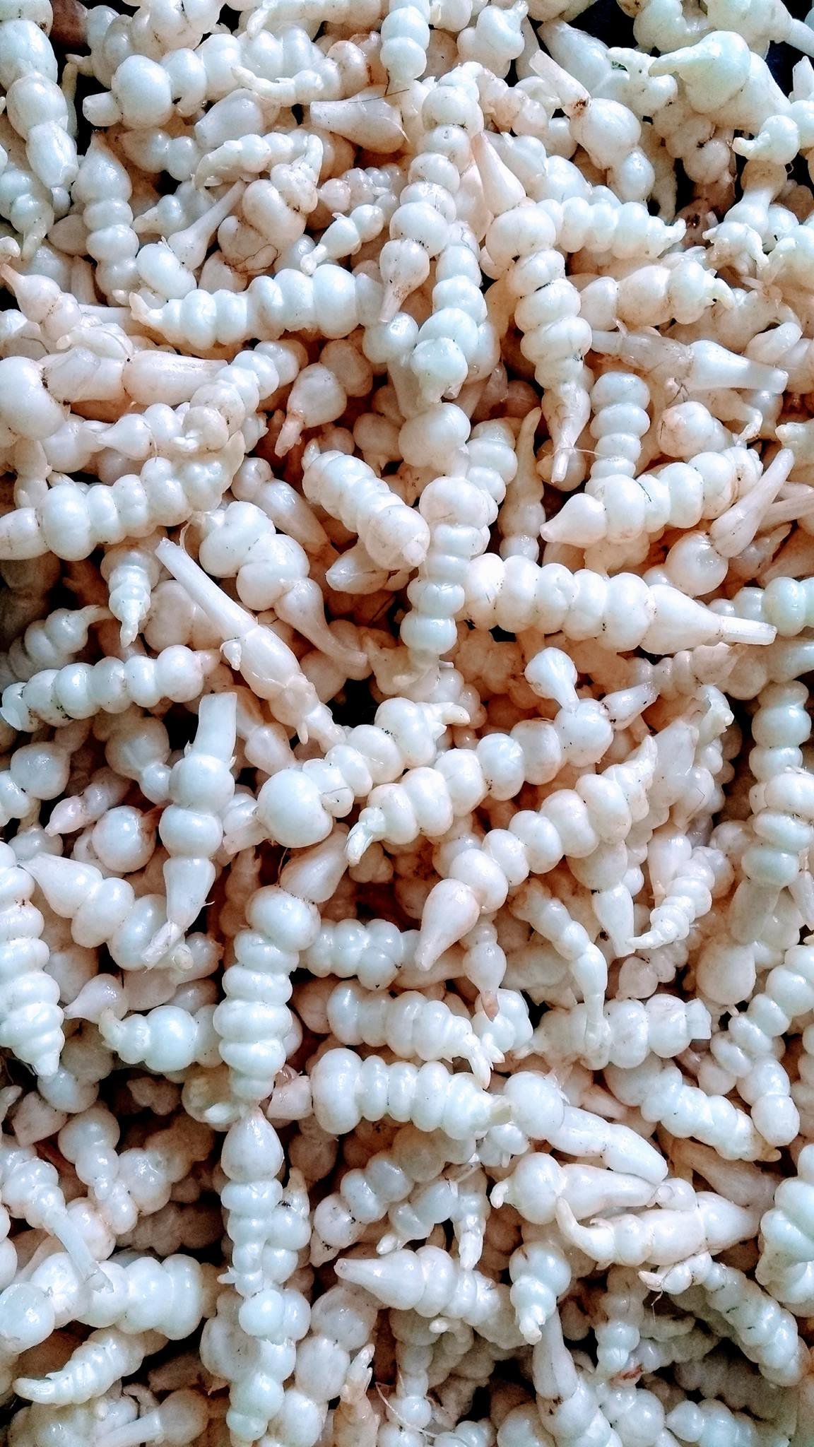 De beaux crosnes du Japon